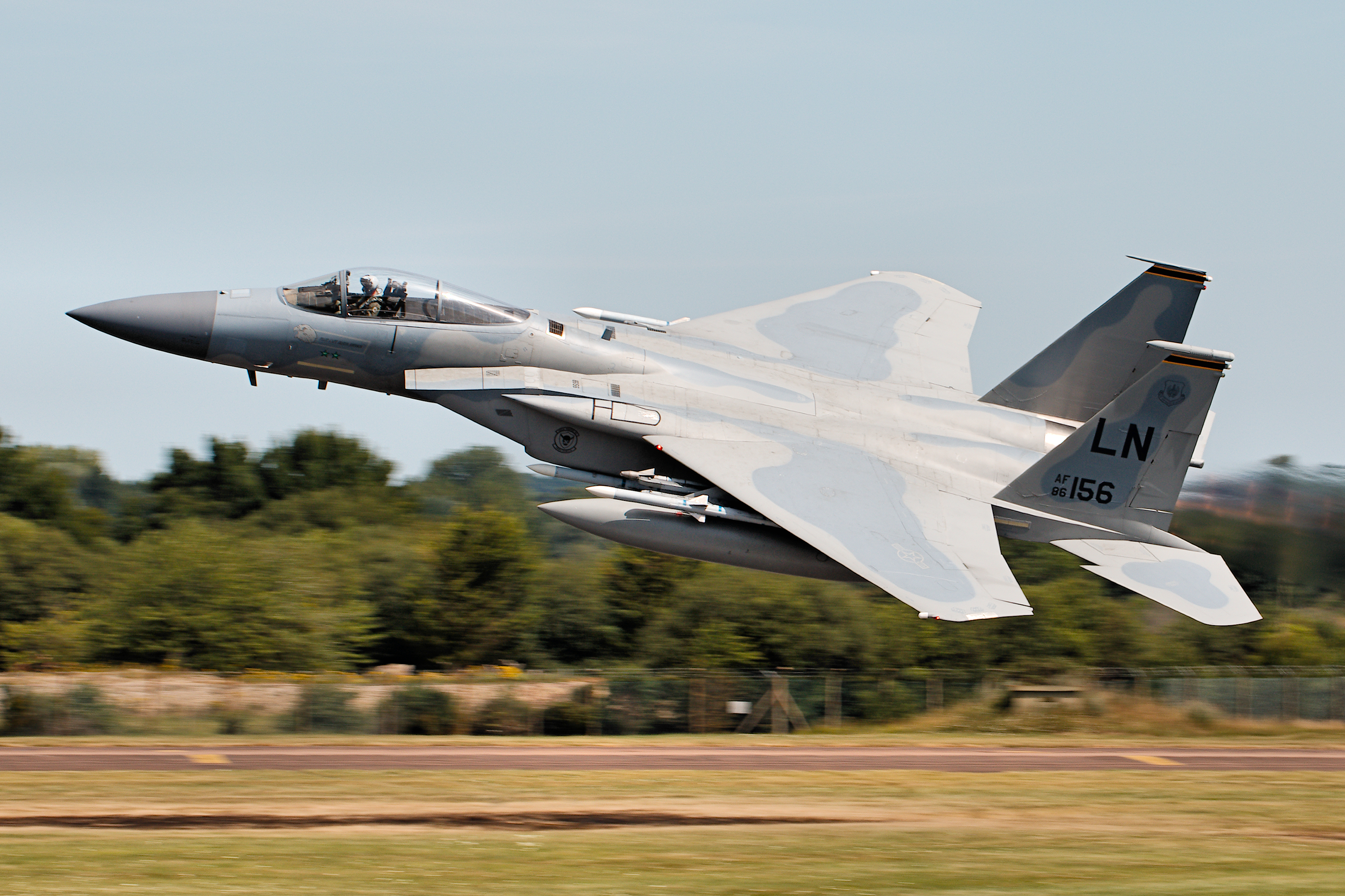 F-15 - RIAT 2017